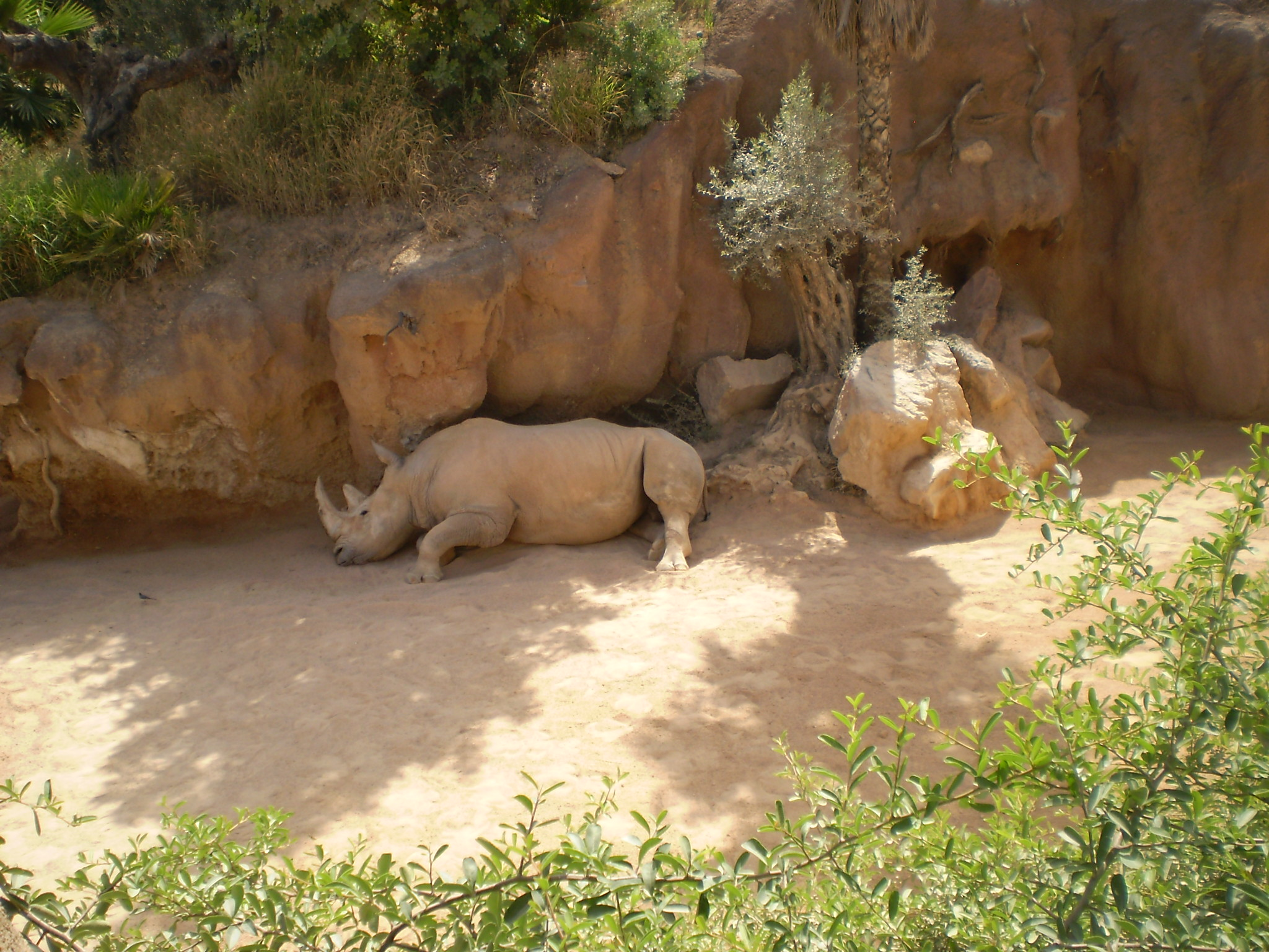 Rinoceronte Blanco, el que ha sido trasladado del antiguo zoologico de Valencia y que solo camina en circulos